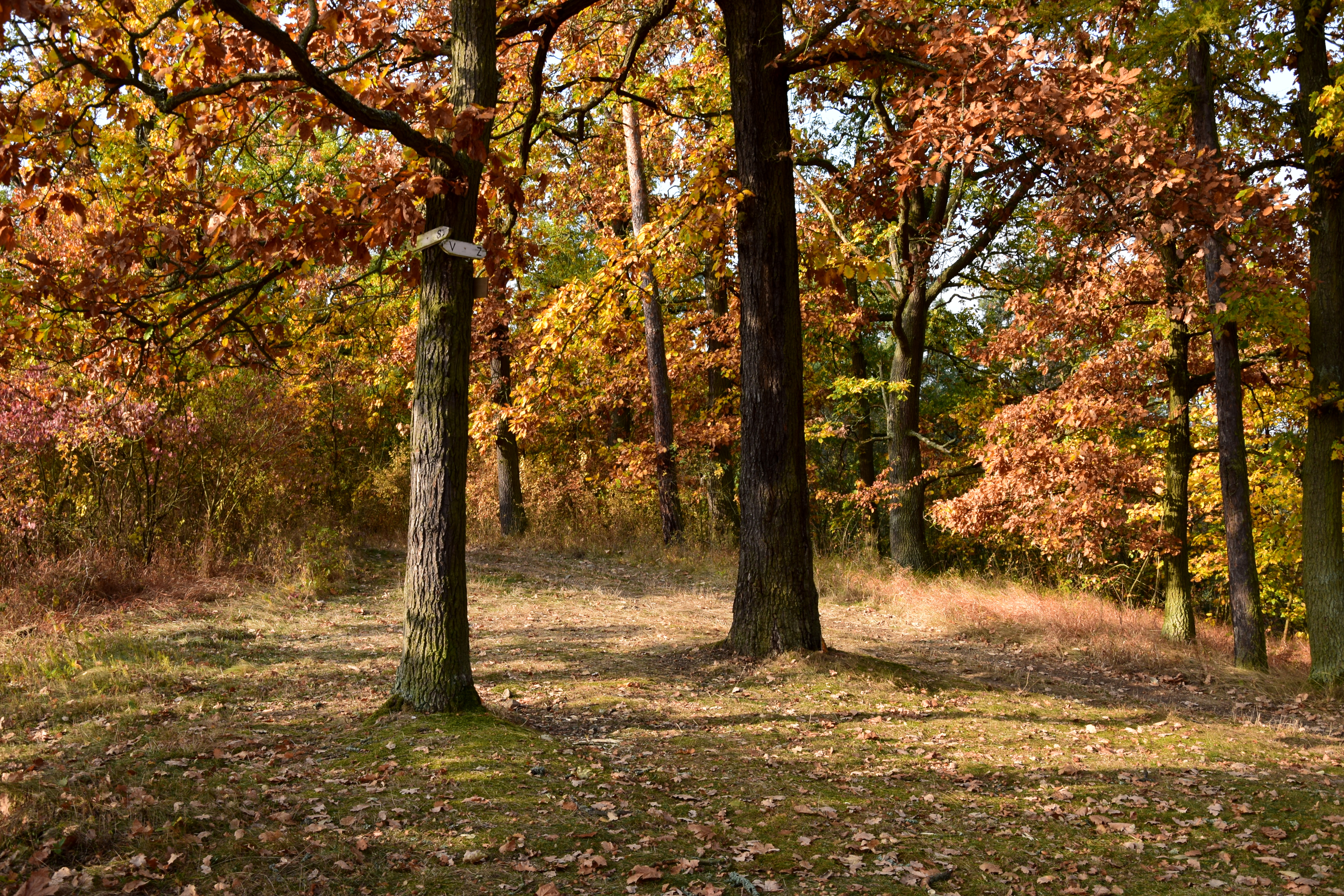 Hradiště Plasy – plocha hradiště